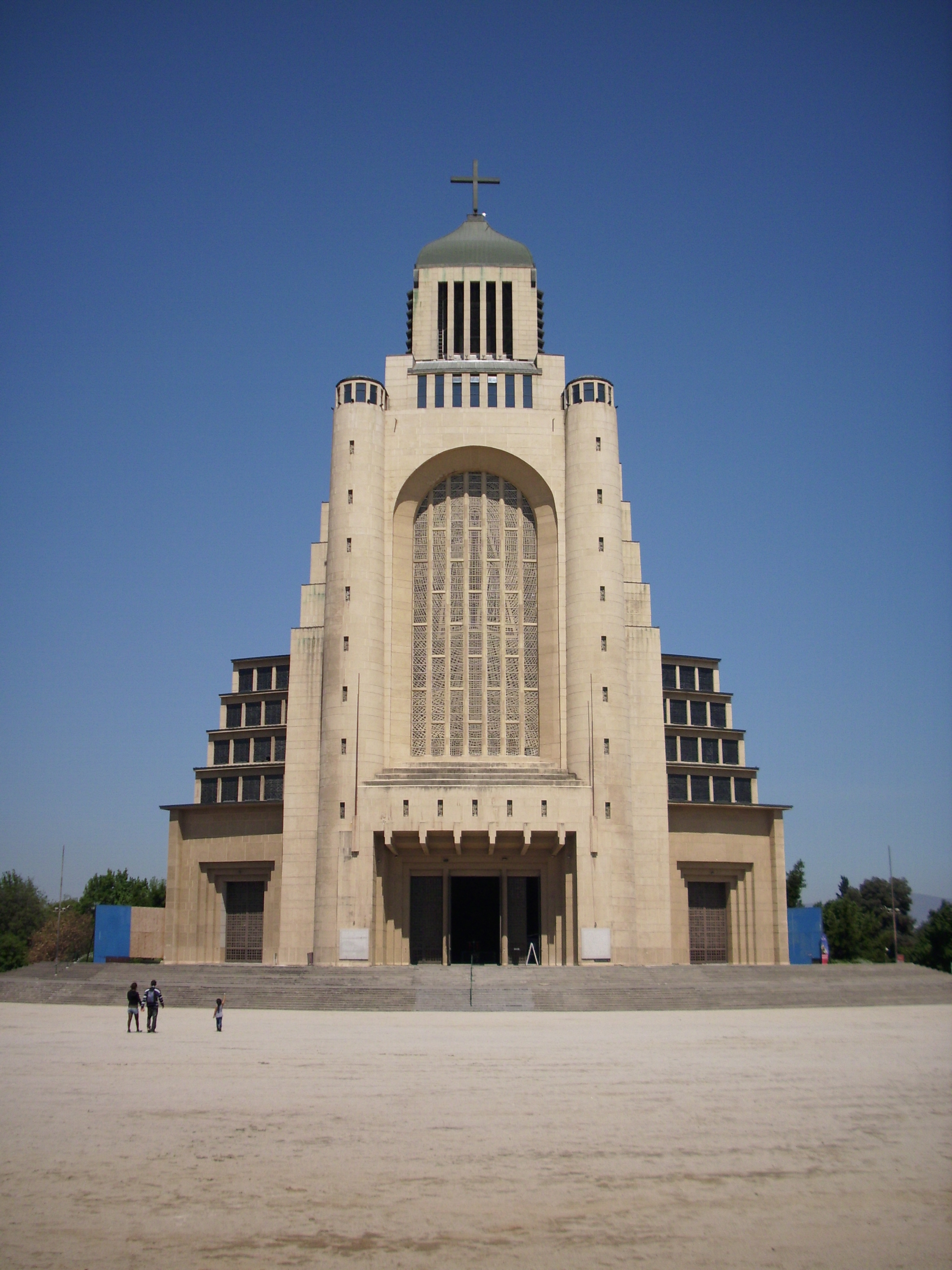 La fachada del Templo Votivo de Maipú. Santiago de Chile, 21 de diciembre de 2012.